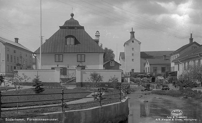 Fornminnesmuséet. Motiv: Söderhamn Nyckelord: Riksintressen Kategori: MuseumFornminnesmuséet.